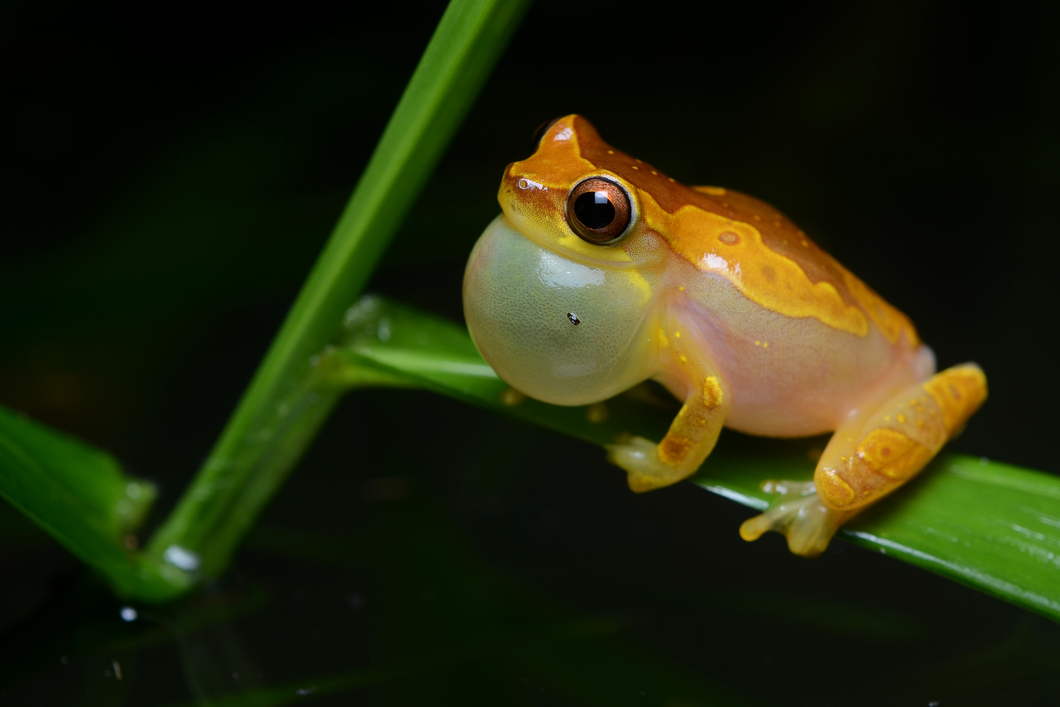 Hylidae: Dendropsophus ebraccatus found at La Selva Biological Station, Sarapiqui, Costa Rica